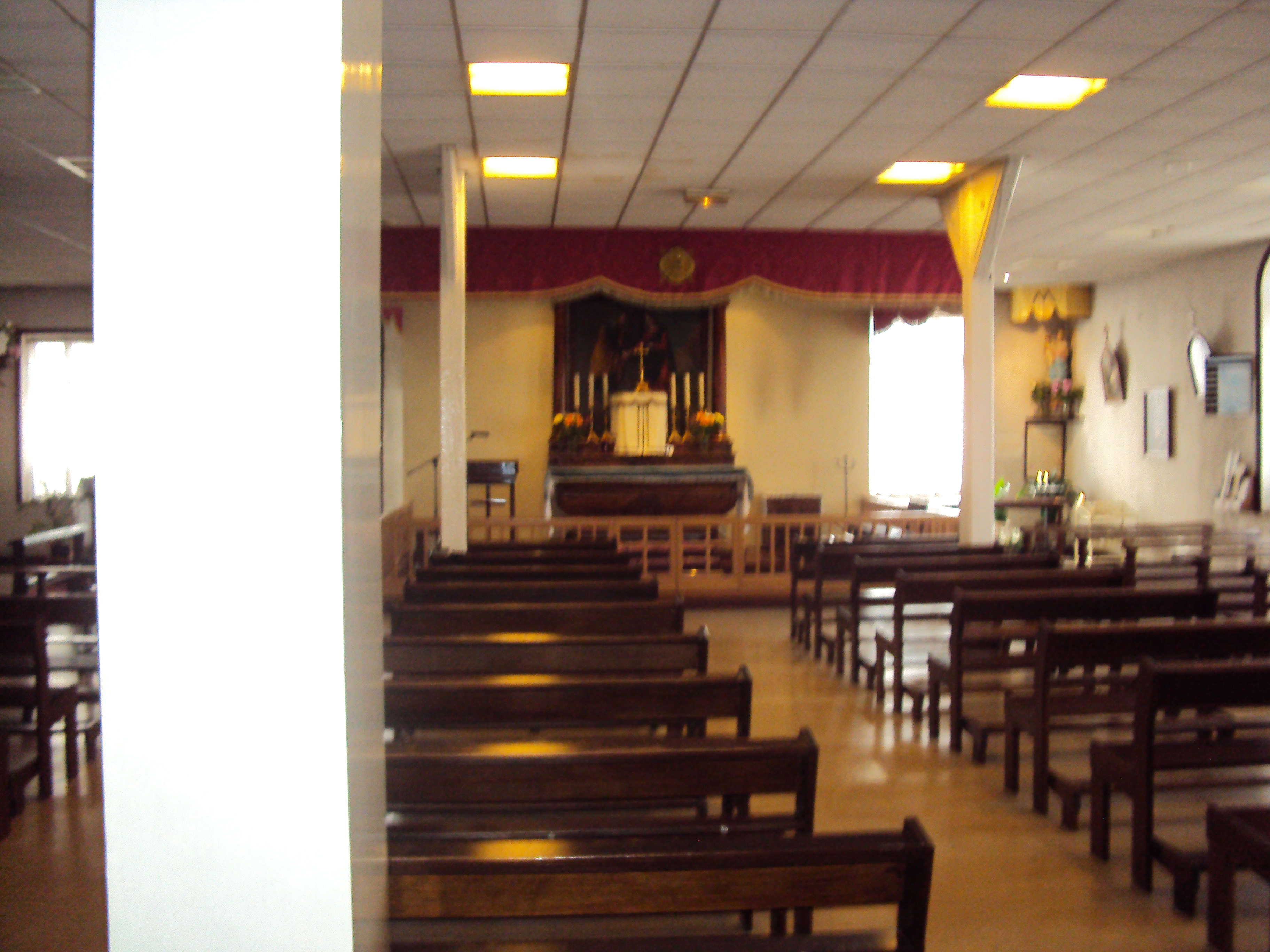 Photographie de l'intérieur et du chœur de la chapelle Notre-Dame du Rosaire à Roanne (France).